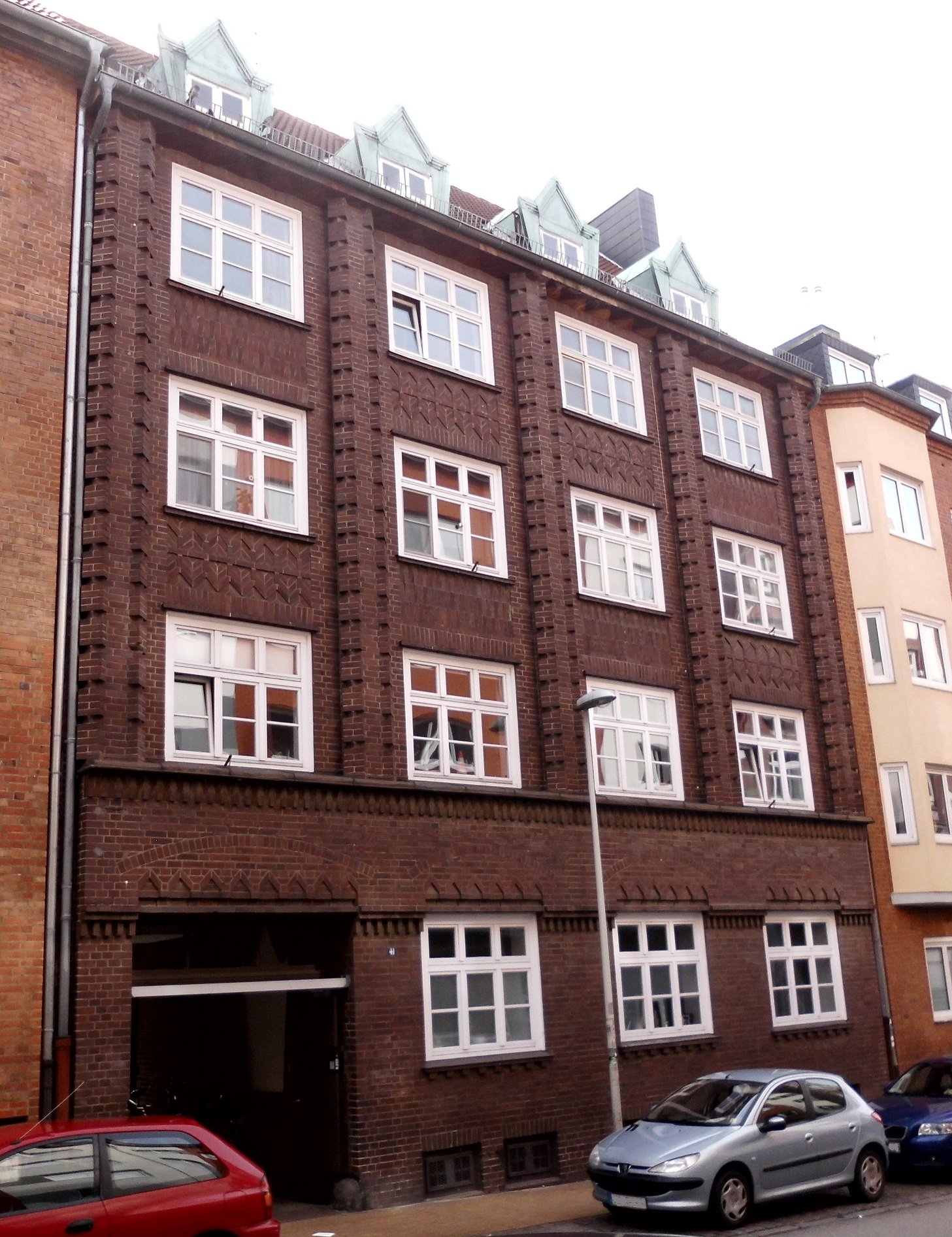 Muhliusstraße 41 im Kieler Stadtteil Damperhof.